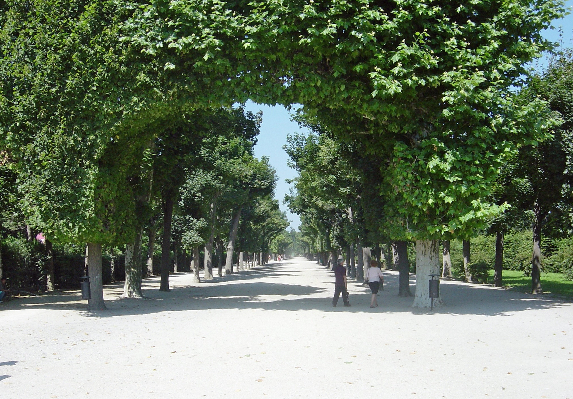 Allee im Schloßpark Schönbrunn